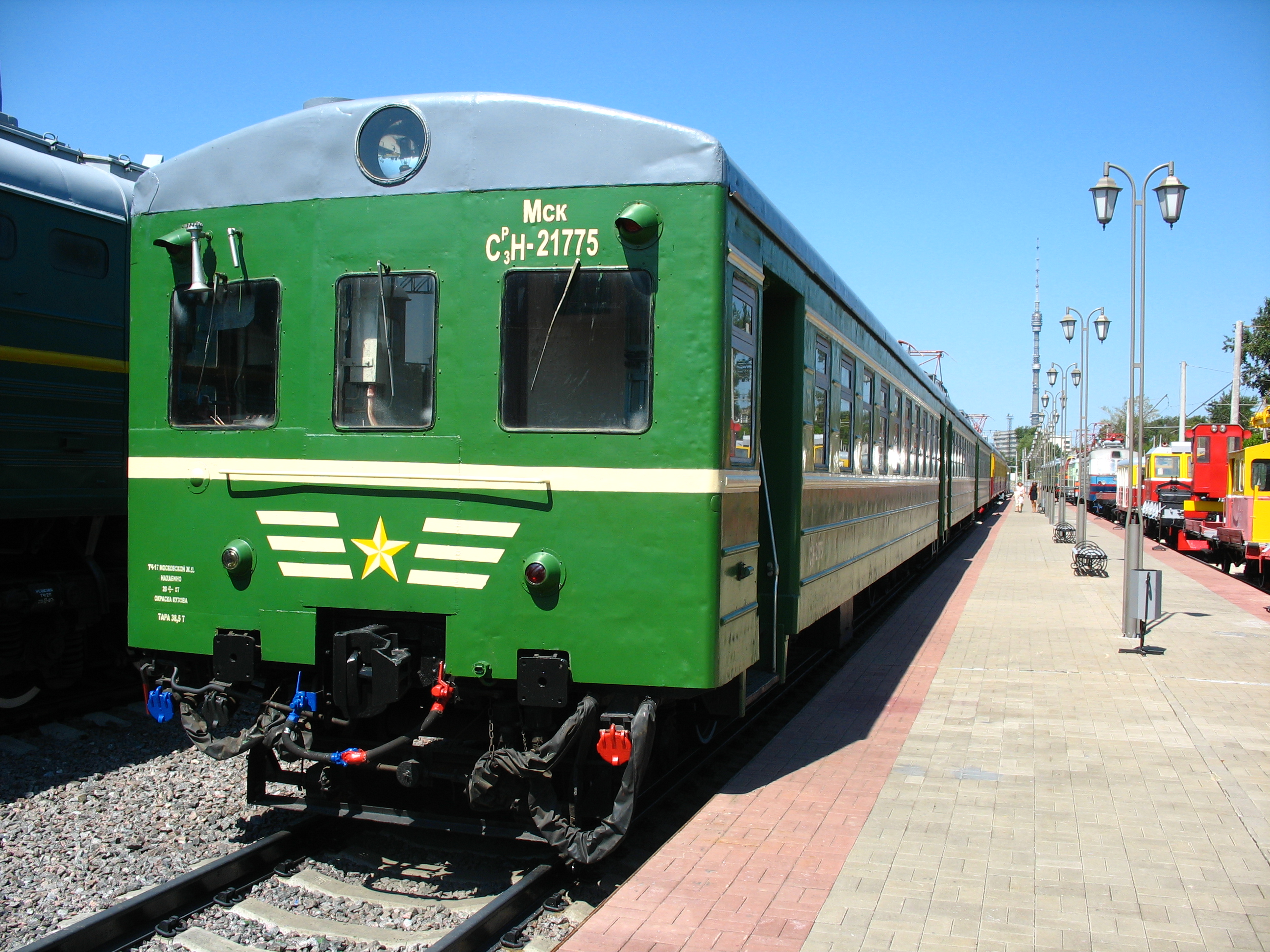 Электросекция СР3Н-1775 постройки 1958-го года. Является экспонатом музея железнодорожного транспорта на ст. Москва-Рижская с момента его основания в 2004 году.